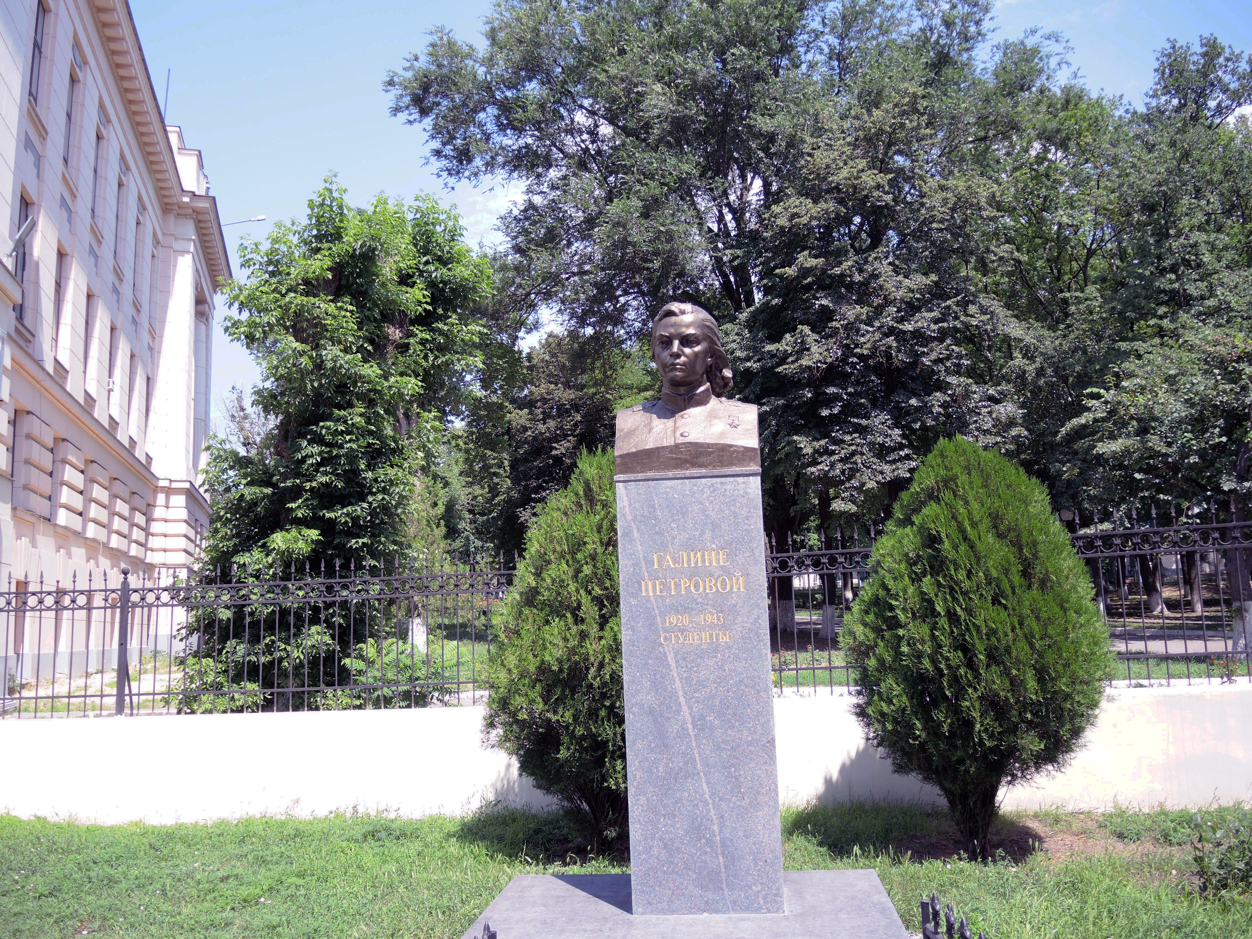 Бюст героя Советского Союза Г.К. Петровой: у гл.корпуса Новочеркасского политехнического ин-та, Новочеркасск, Ростовская область